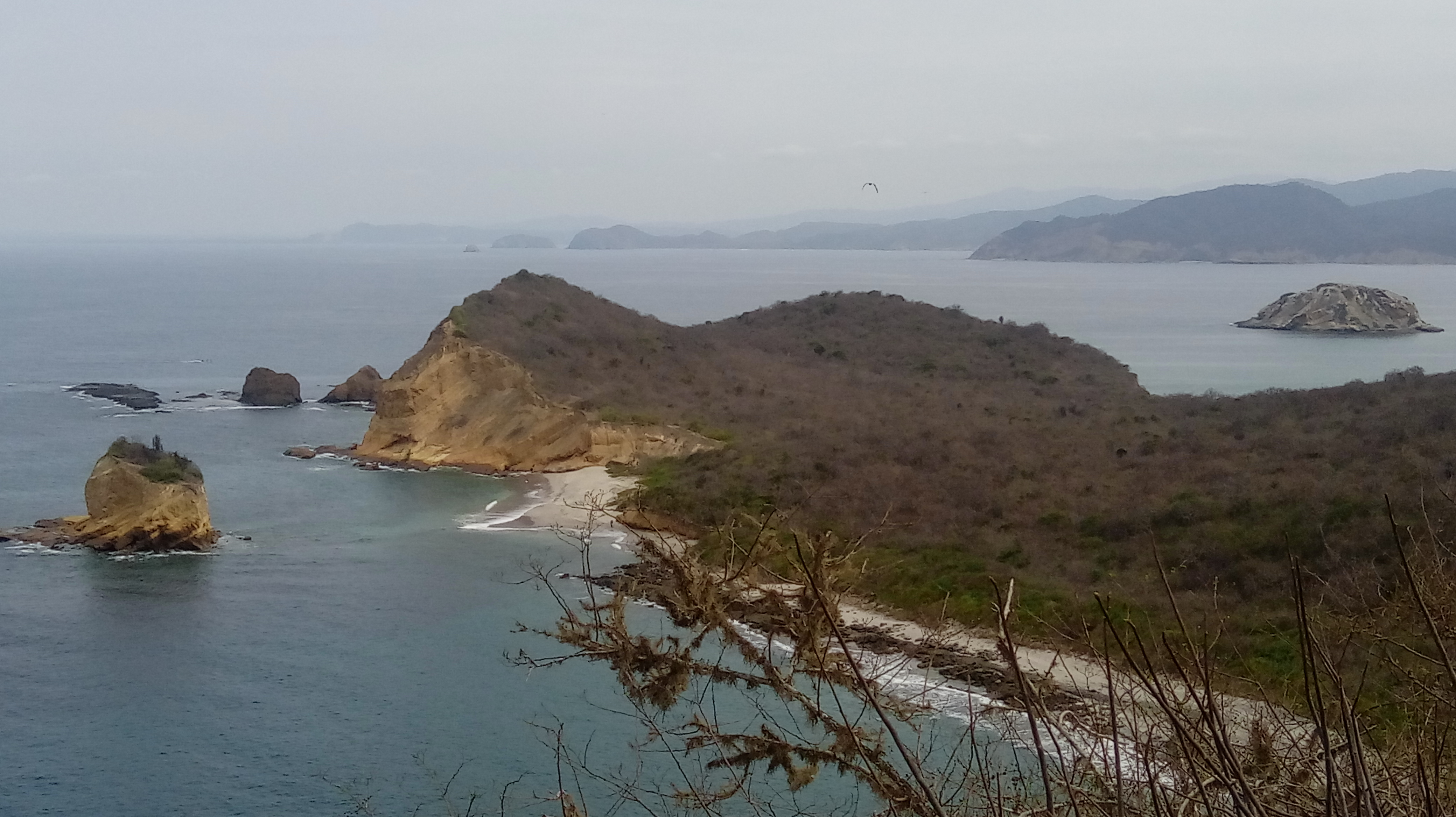 Panorámica desde el mirador